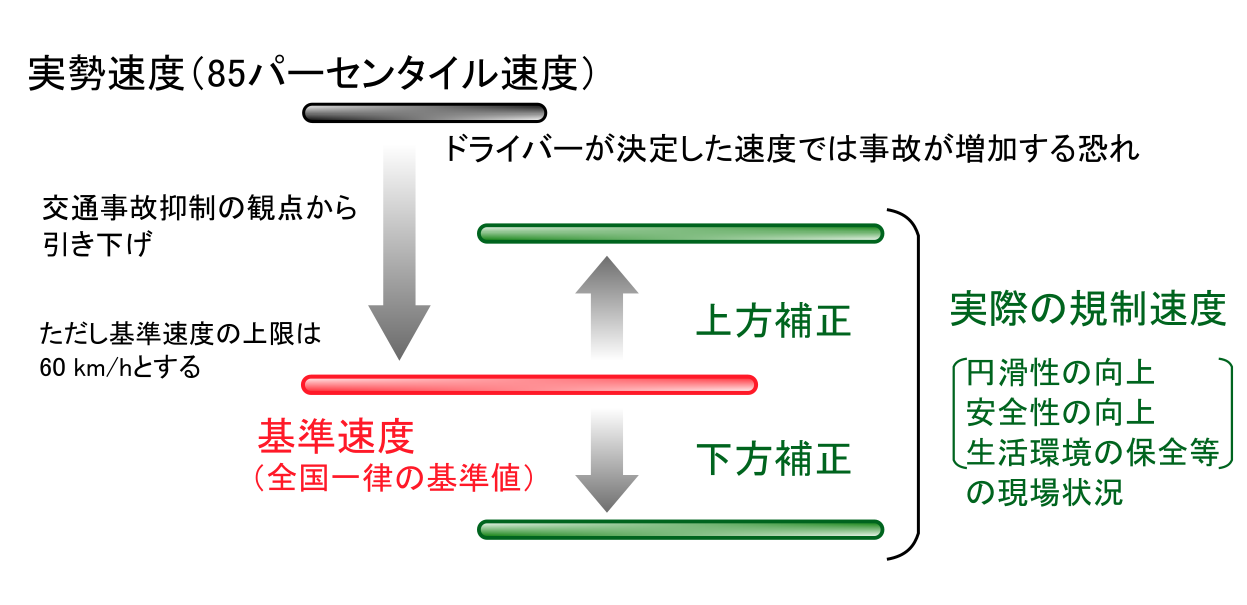 現在日本で行われている道路の最高速度の設定方法